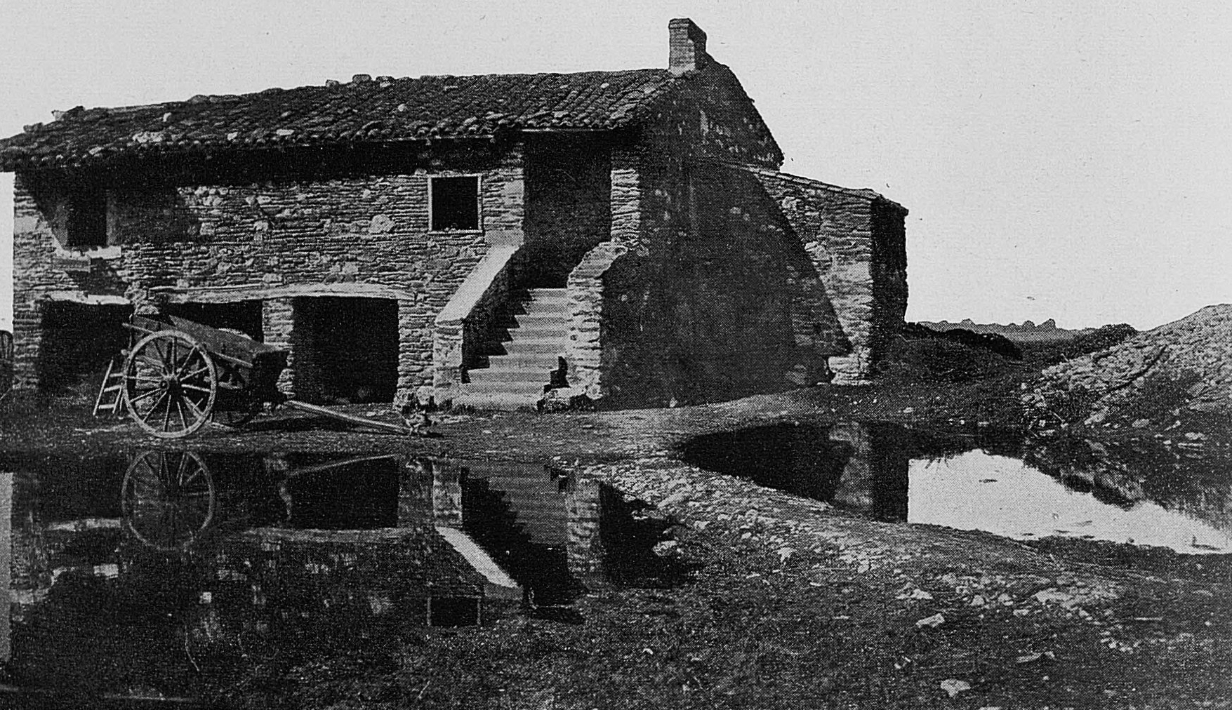 Dictionnaire illustré des communes du département du Rhône. Tome 1 / par MM. E. de Rolland et D. Clouzet.